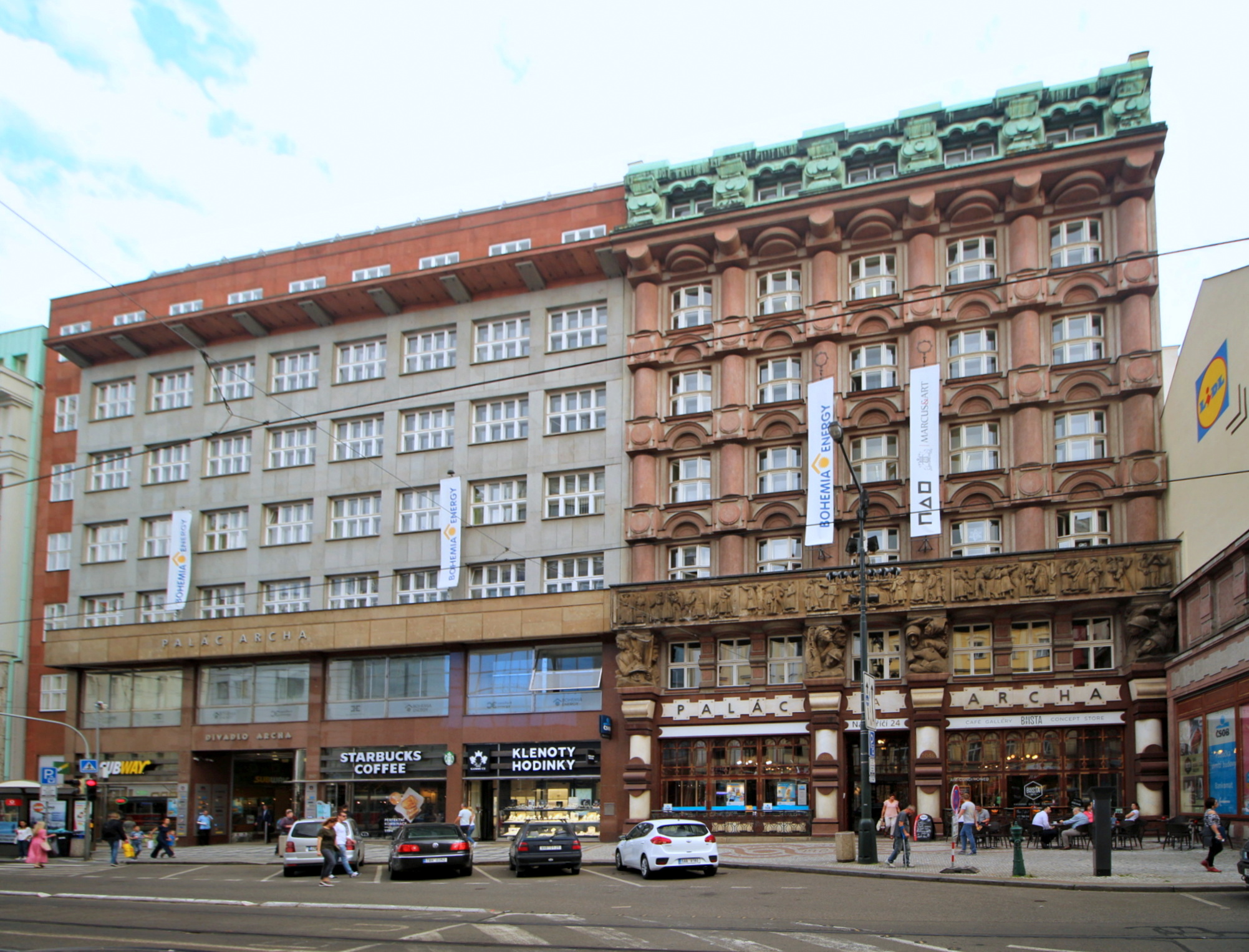 Praha, ulice Na Poříčí, rondokubistická budova banky